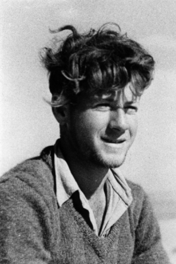 פלי"ם ספינות המעפילים ג - אקסודוס - ספינות המעפילים – אקסודוס יציאת אירופה תשז - הצוות הפיקודי של האוניה - רב החובל. יצחק (אייק) אהרונוביץ